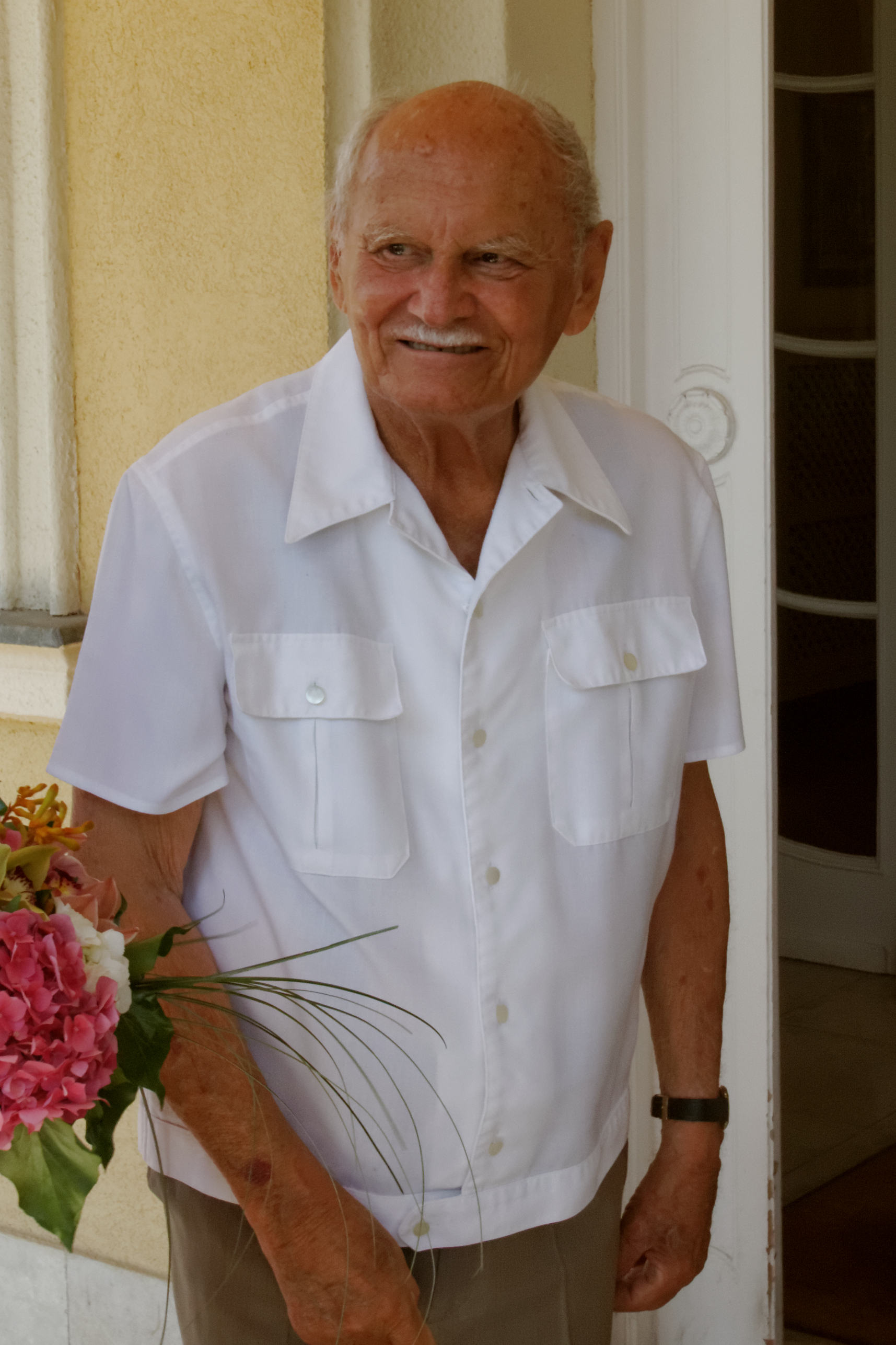 Árpád Göncz, ungarischer Präsident (1990-2000)